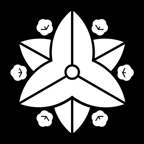 「変り向う花澤瀉（八重澤瀉）」紋（染抜）